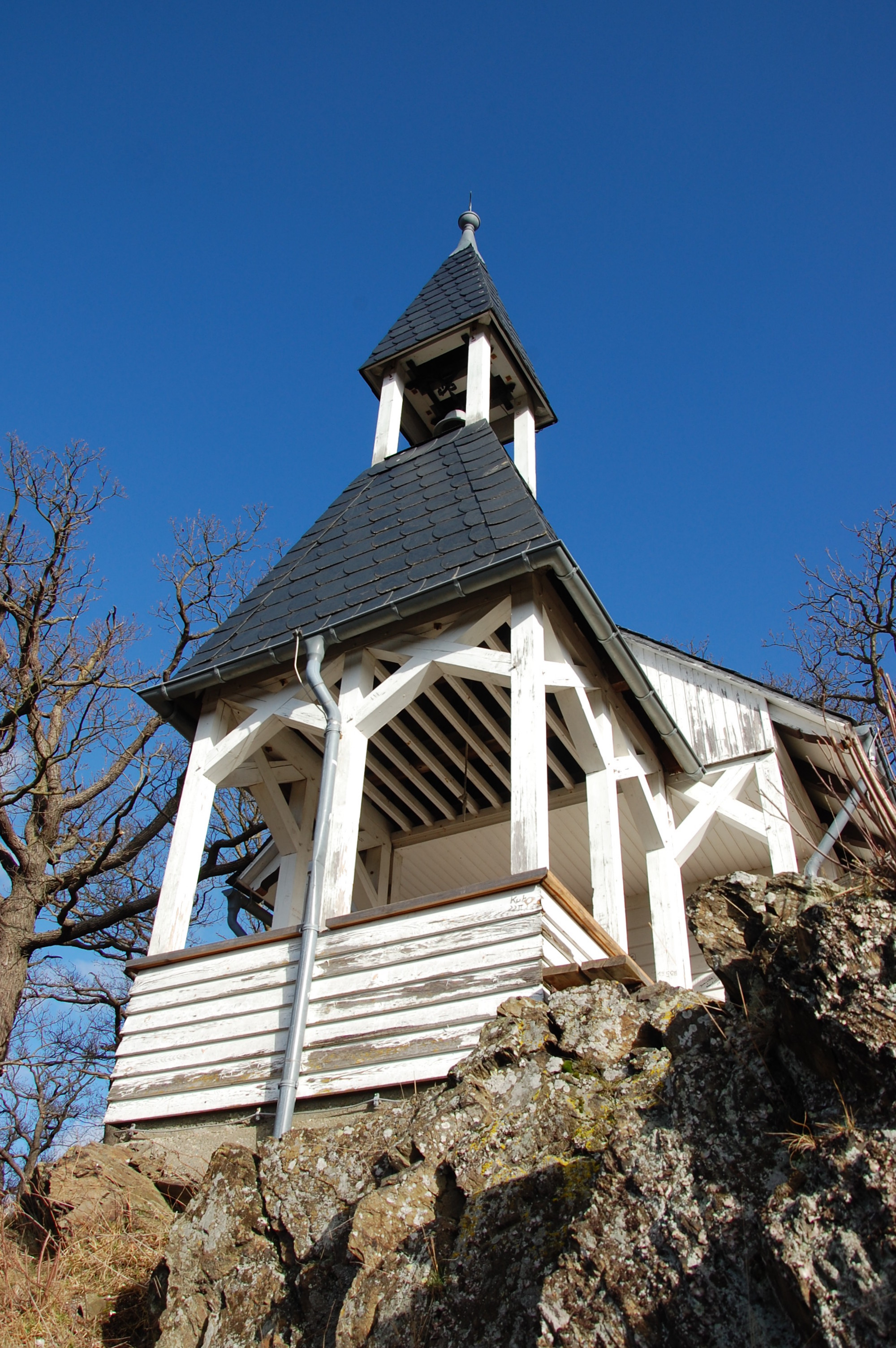 Köthener Hütte am Selketal